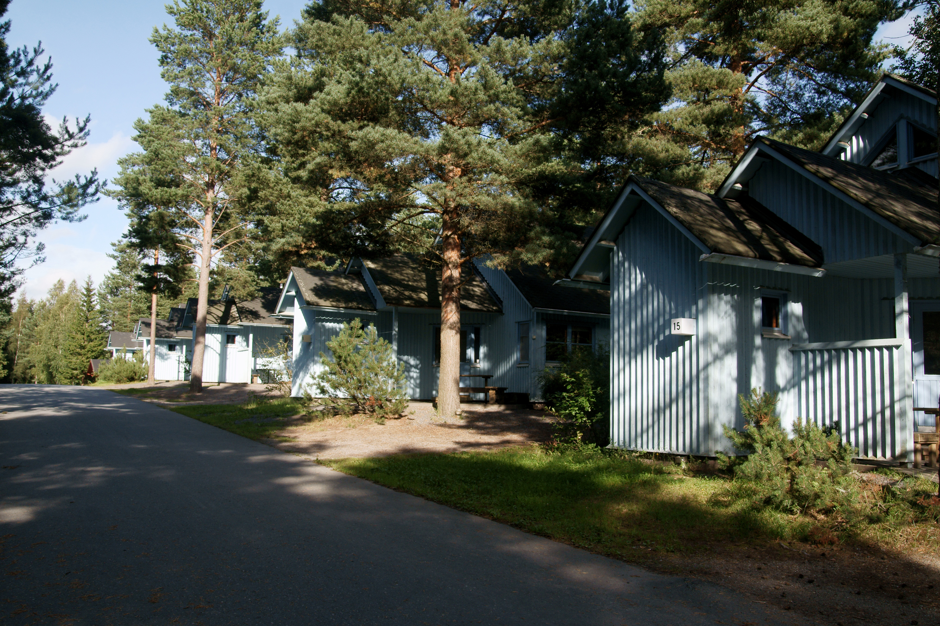 Mökkejä Yyteri Campingin alueella.